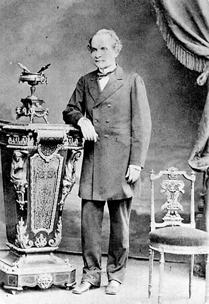 Gabinete Cotegipe